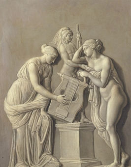 An Allegory